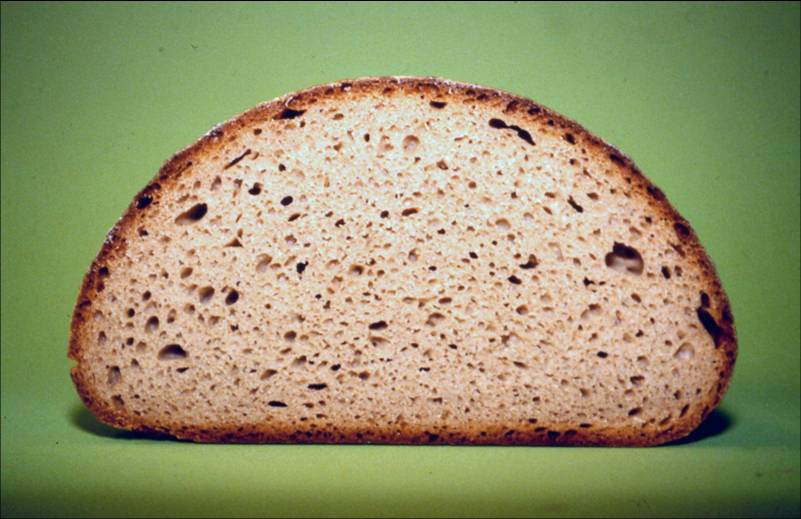 Roggenbrot mit optimaler Verkleisterung. Hohes Gebäck. Großes Volumen.